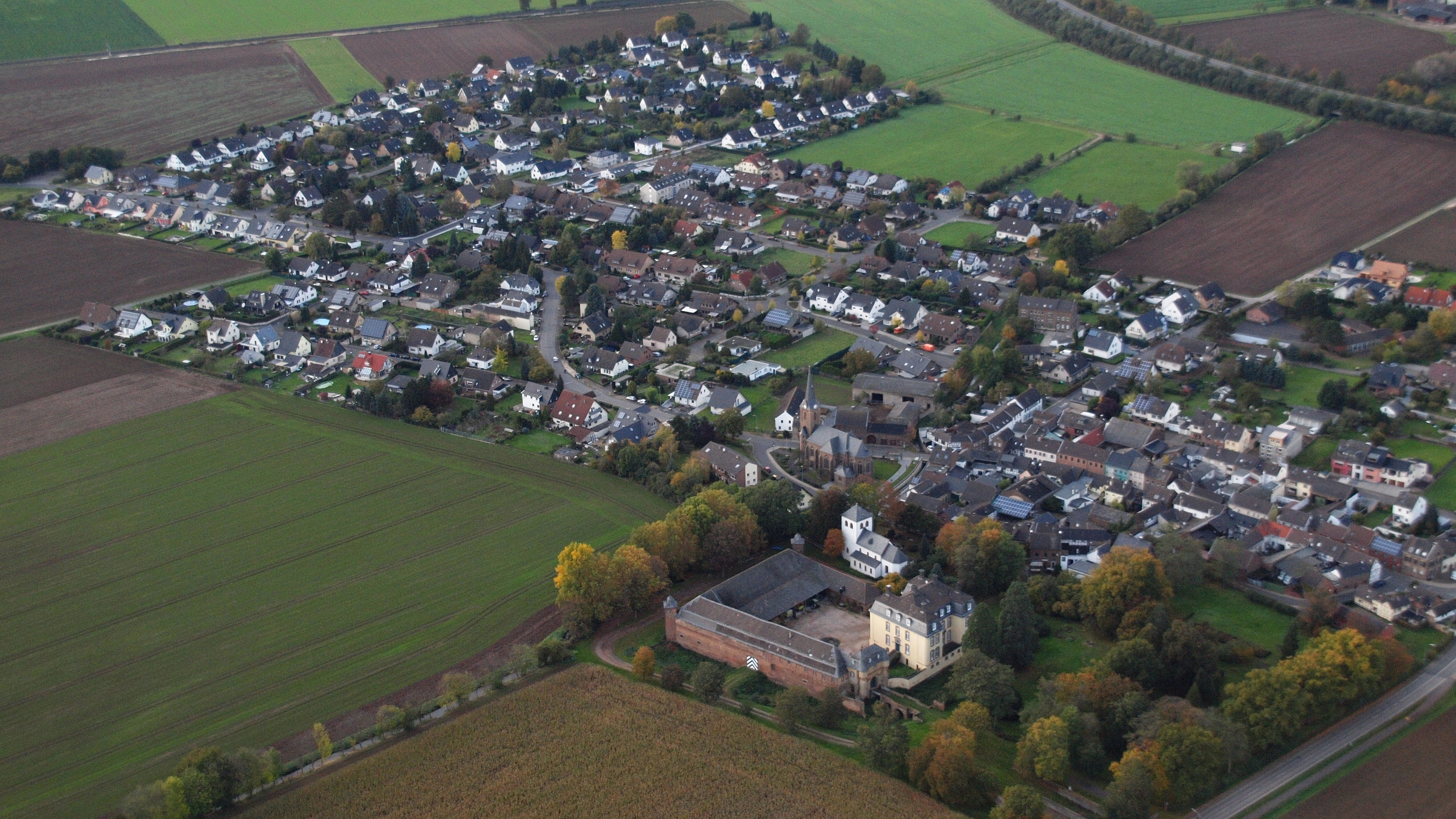 Kleinbüllesheim, Luftaufnahme (2014)